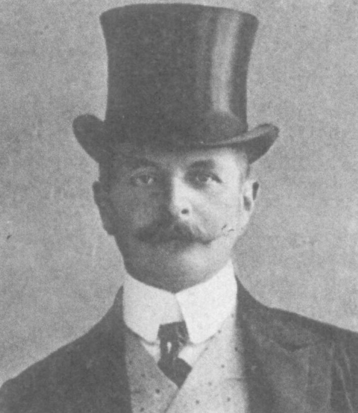 Foto von Alfred Fürst und Altgraf zu Salm-Reifferscheidt-Dyck (1863–1924)